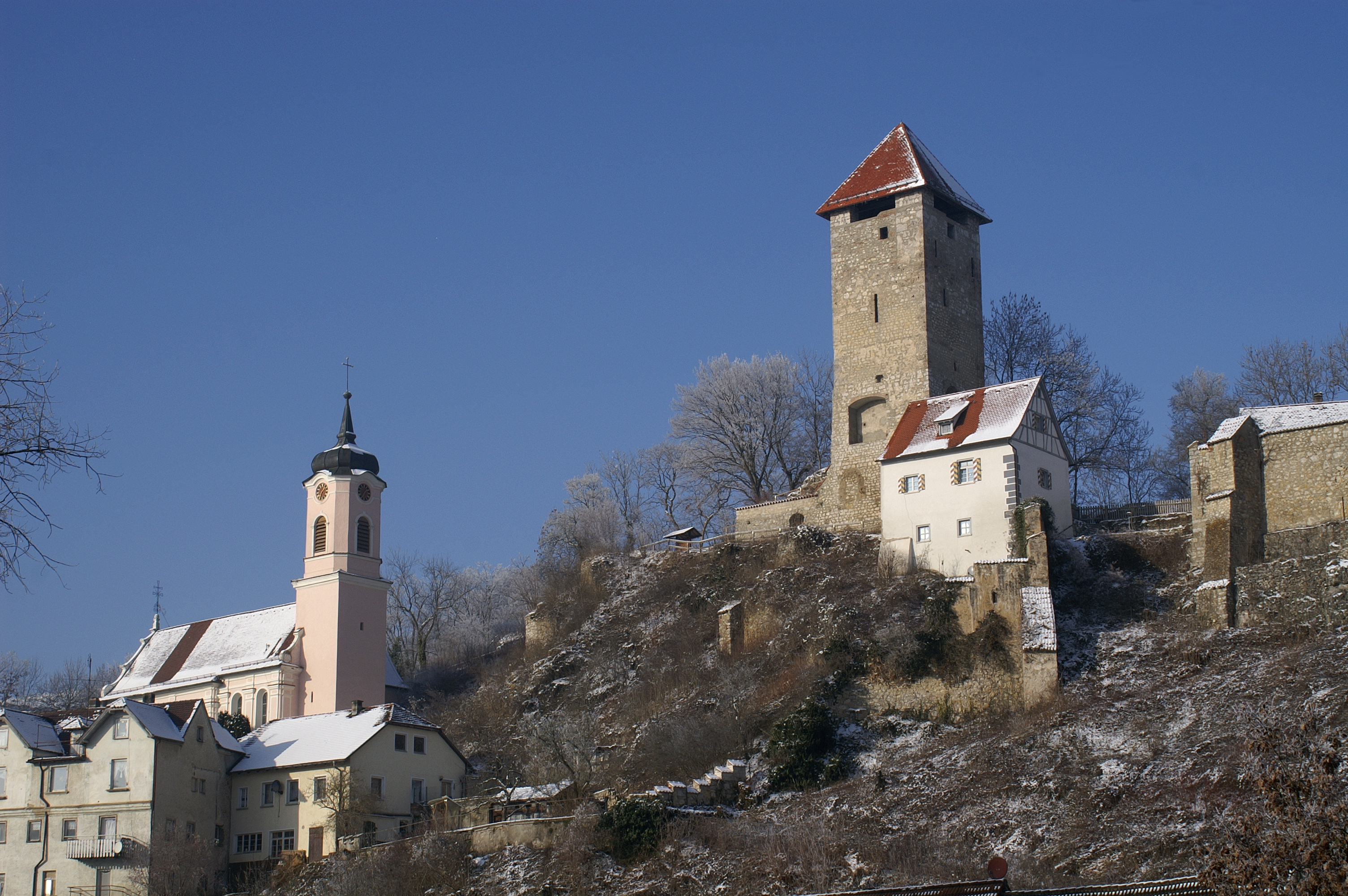 Rechtenstein im Alb-Donau-Kreis mit Burg Rechtenstein und Pfarrkirche St. Georg